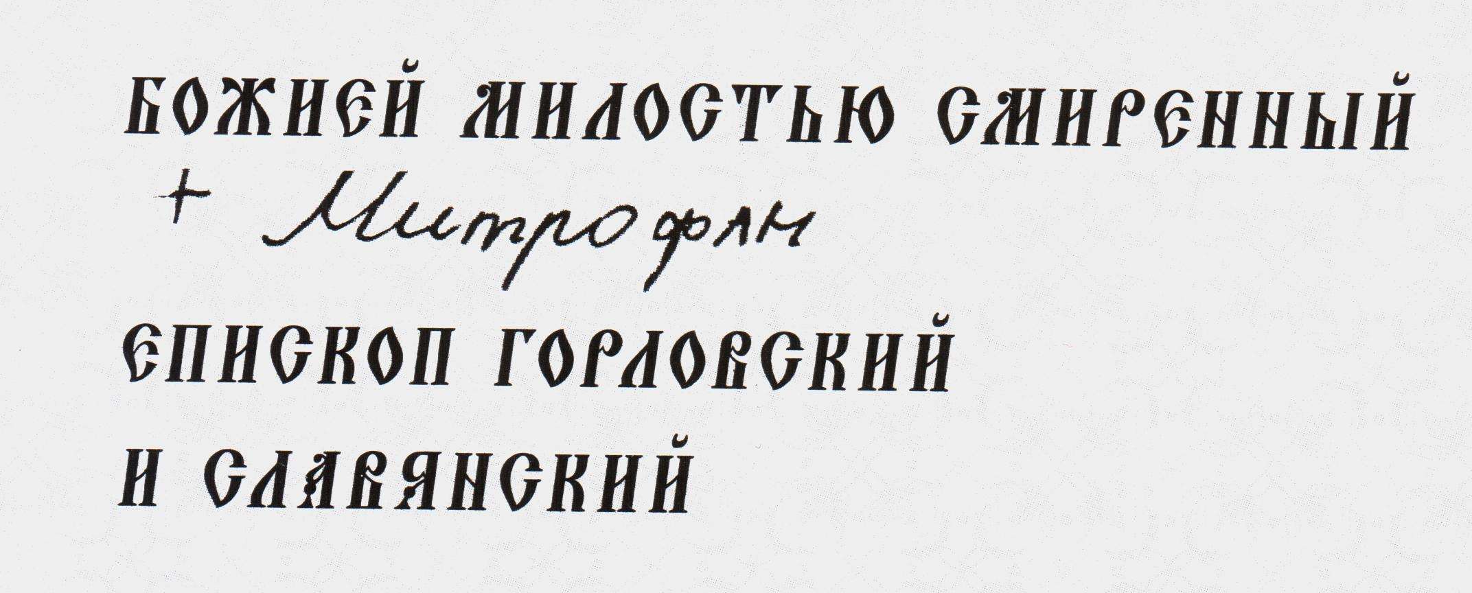 Подпись архиепископа Горловского и Славянского Митрофана (Никитина) под посланием. Пасха 2008 года.